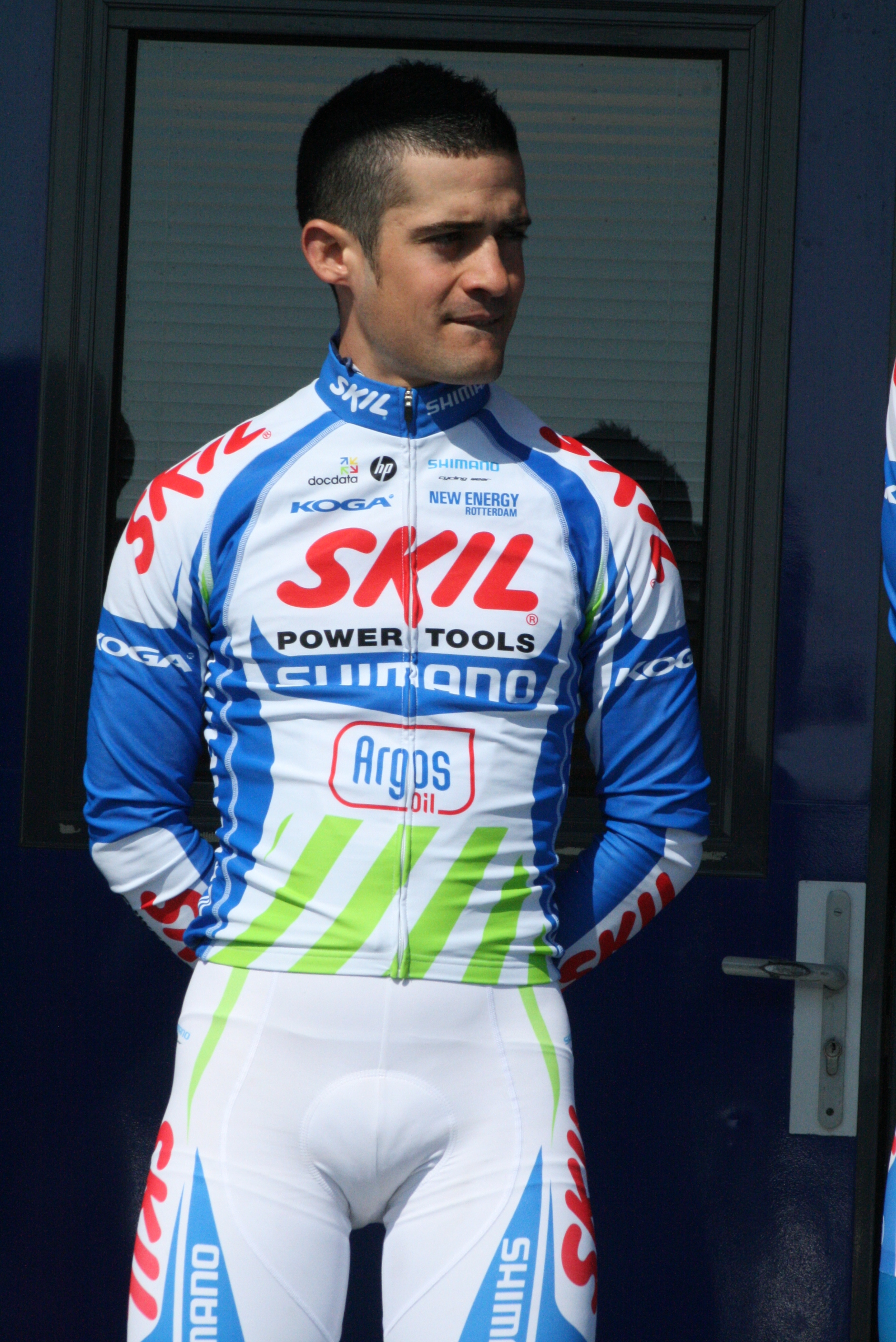 Présentation des coureurs au départ de la première étape Thomas Damuseau